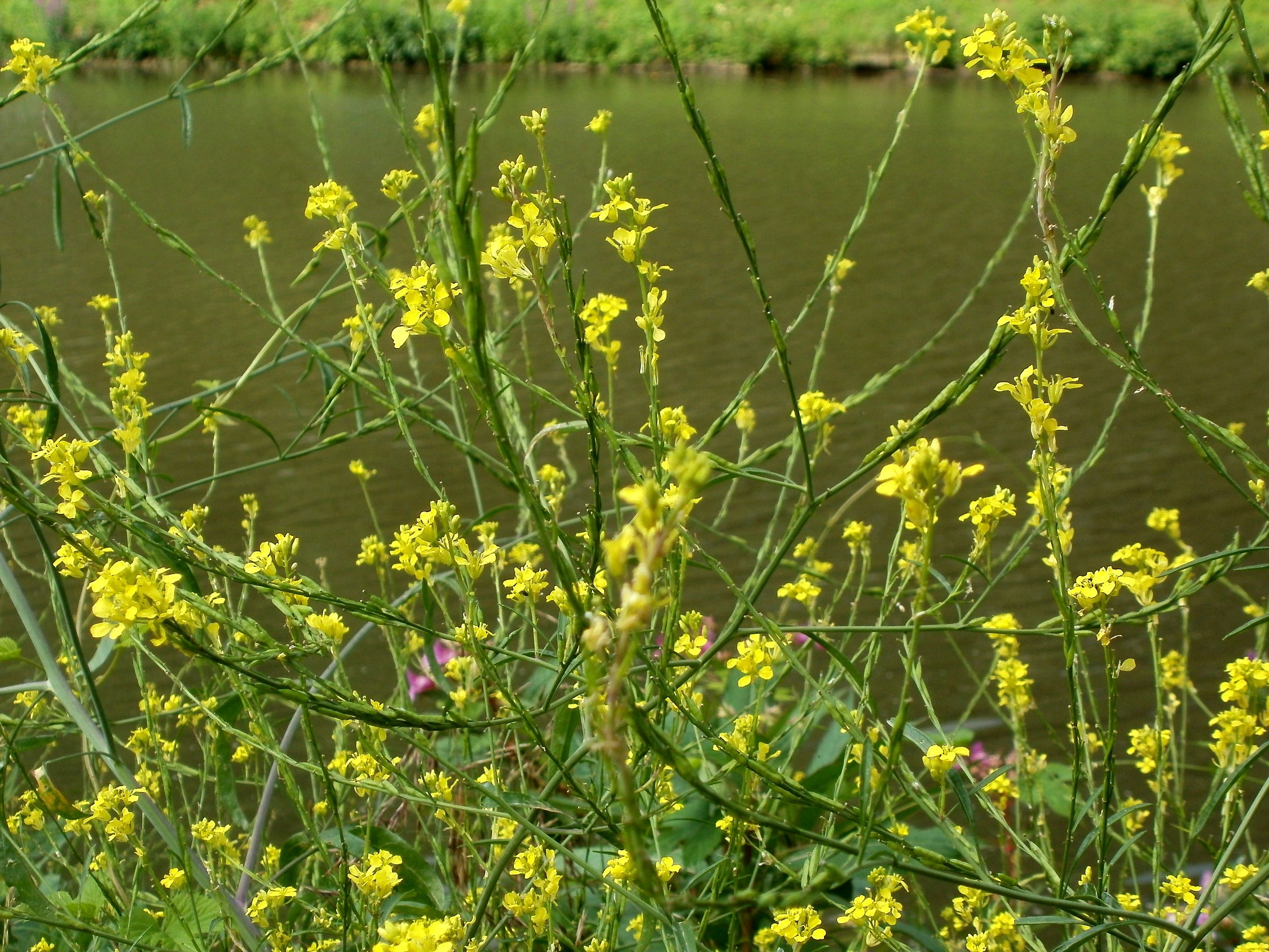 Schwarzer Senf (Brassica nigra) an der Saar in Saarbrücken